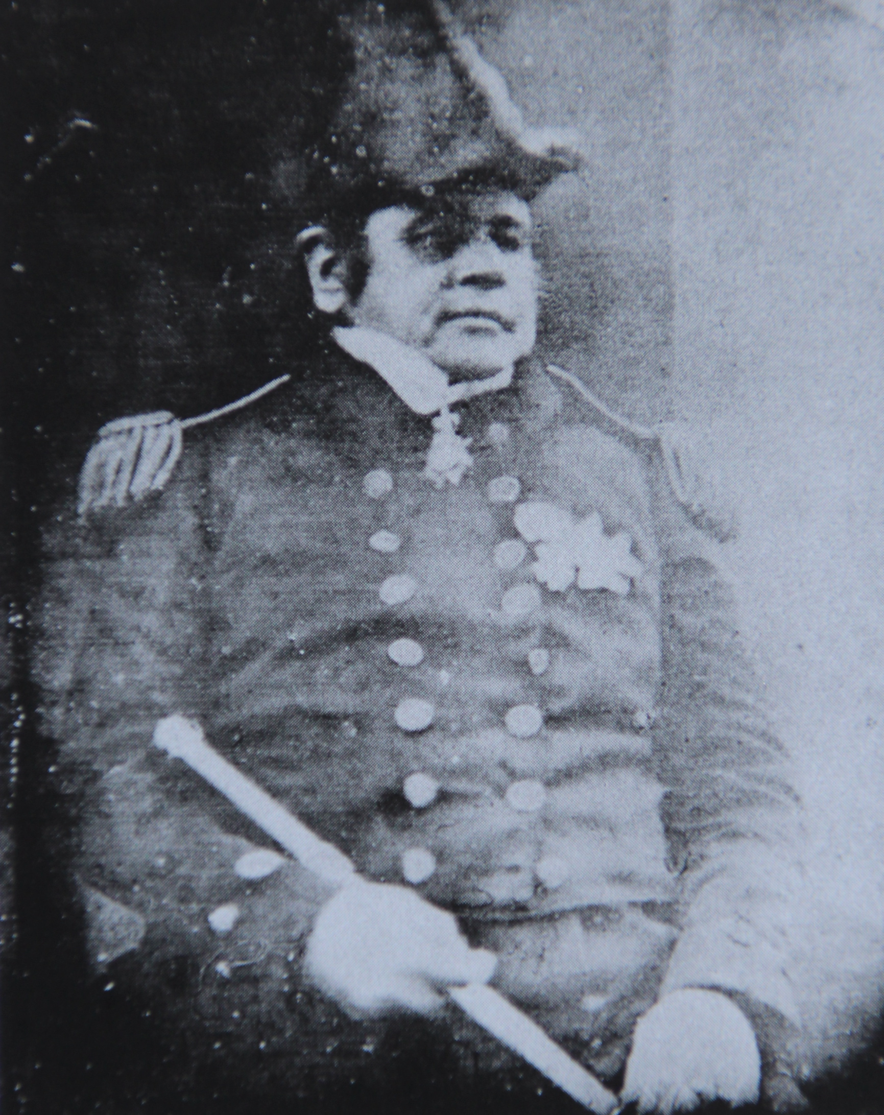 John Franklin